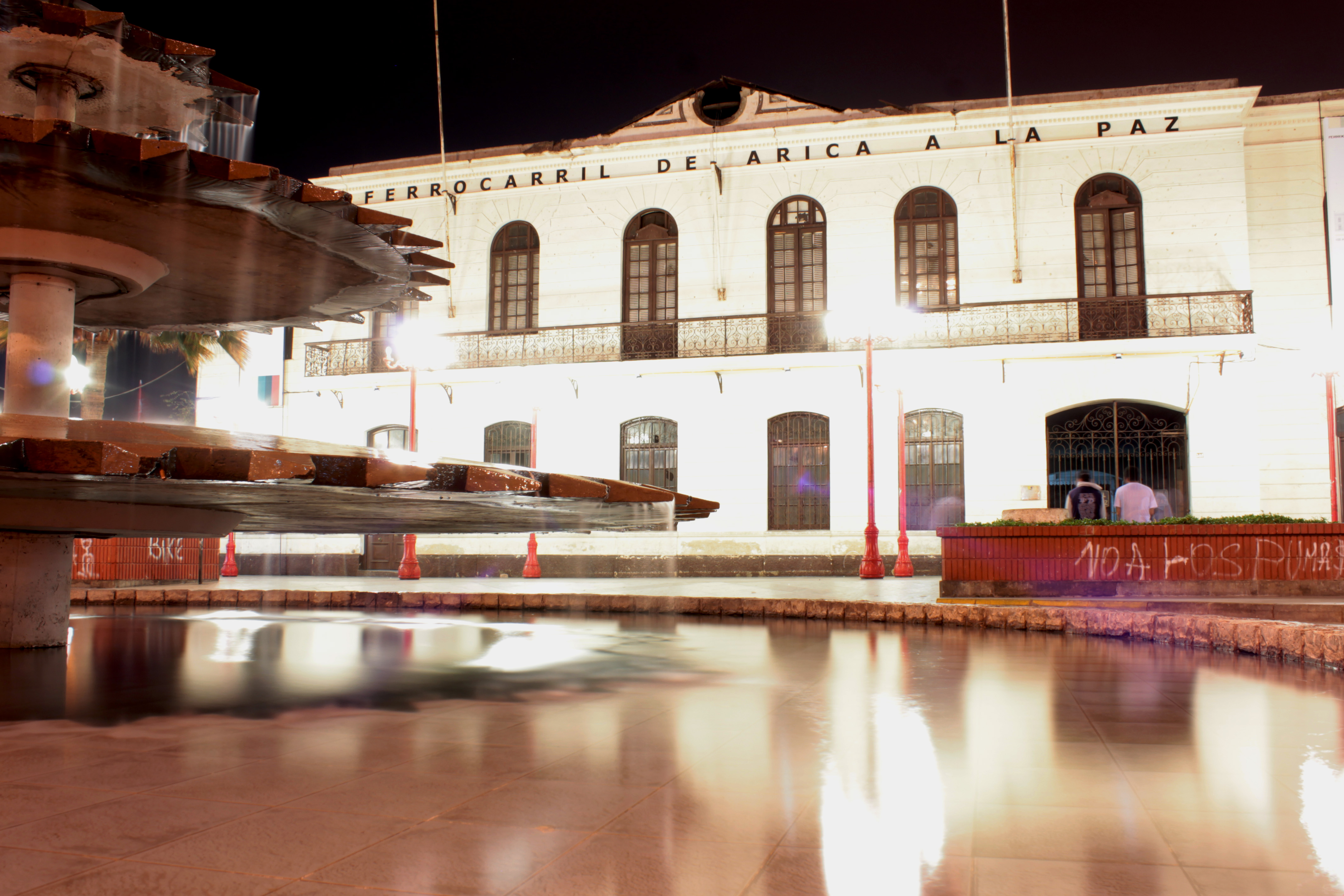 Estación de Ferrocarril Arica-La Paz y andén This is a photo of a national monument in Chile: 258